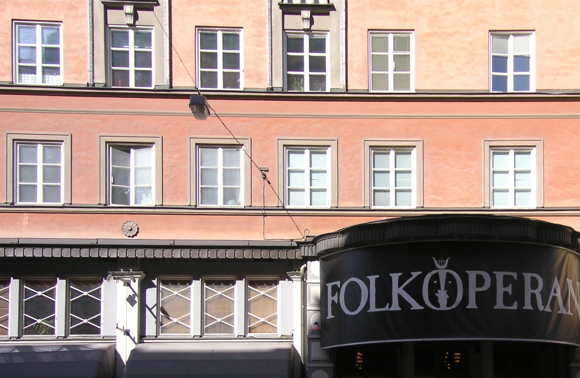 Hornsgatan 72, fasad "Folkoperan" ritat av "Höög & Morssin" 1928